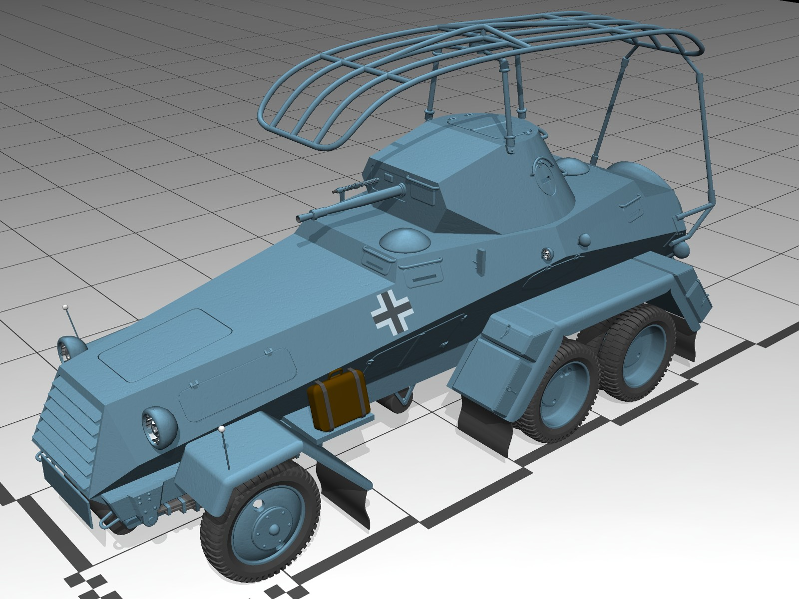 Sd.Kfz 232 (6-Rad) *3d model, iso view)